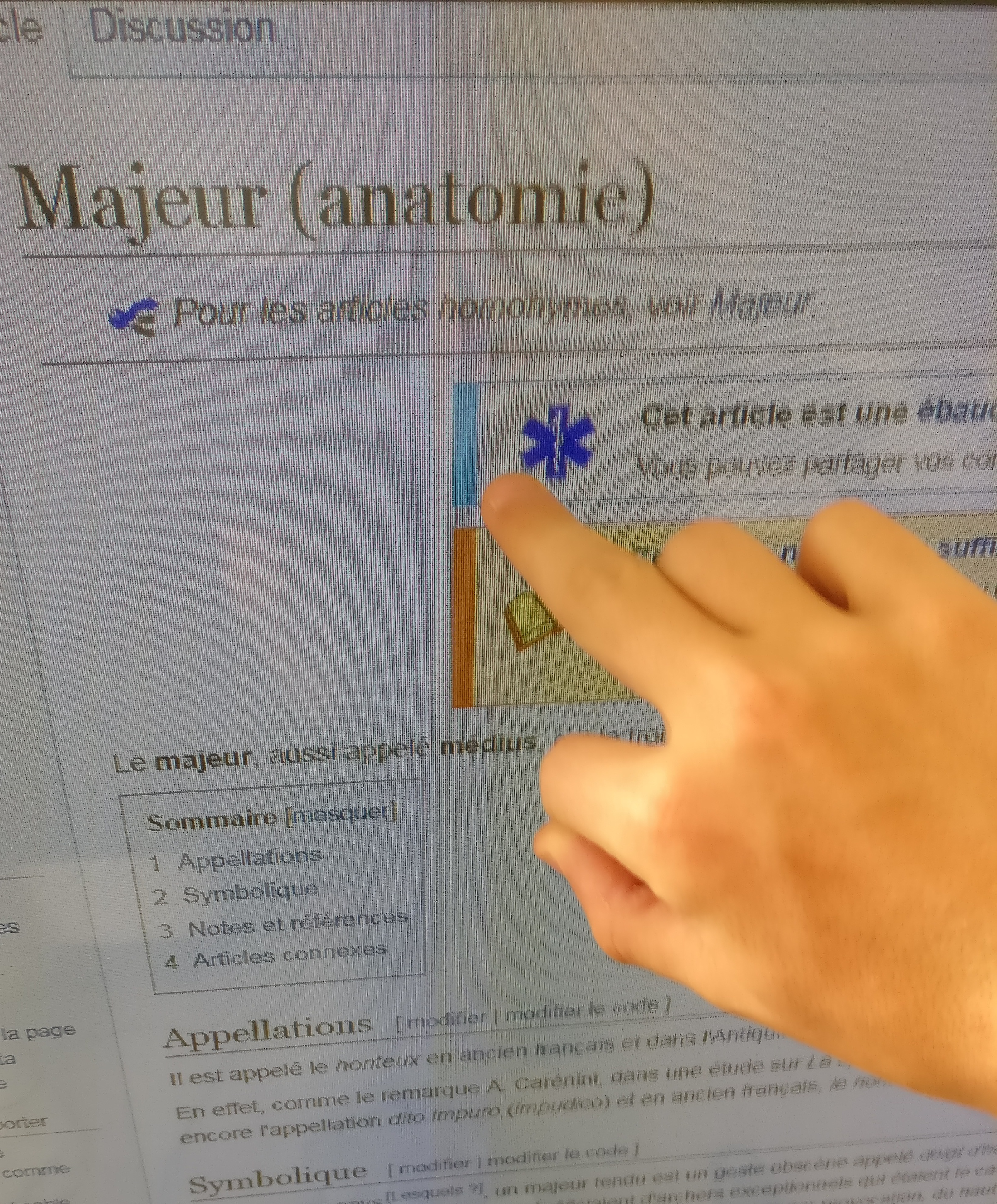 Doigt D'honneur sur la page wikipedia du majeur